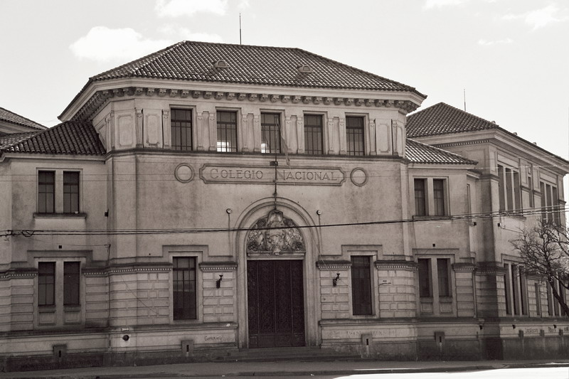 (ex) Colegio Nacional, Bragado, Buenos Aires Province.